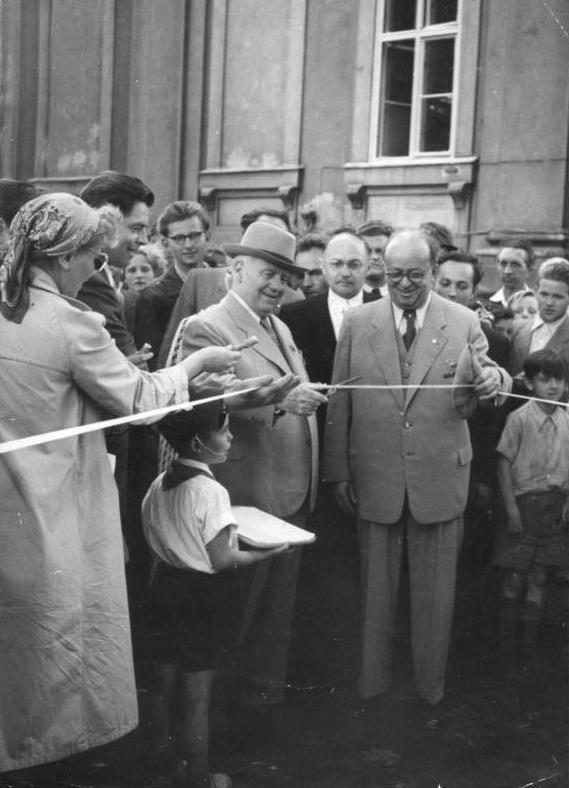 Berlin, Tierpark-Eröffnung , mit Wilhelm Pieck Zentralbild/Weiß 2.7.1955 Feierliche Eröffnung der Berliner Tierparks Am 2. Juli 1955 wurde in Anwesenheit des Präsidenten der Deutschen Demokratischen Republik, Wilhelm Pieck, und des Oberbürgermeisters von Groß-Berlin, Friedrich Ebert, der erste Teilabschnitt des neuen Tierparks in Berlin-Friedrichsfelde mit einer Fläche von 60 ha eröffnet. Viele Berliner hatten sich eingefunden um dem festlichen Ereignis beizuwohnen. UBz.: Präsident Wilhelm Pieck bei der symbolischen Eröffnung des Tierparks. (Rechts) Oberbürgermeister Friedrich Ebert und (im Hintergrund, Mitte) Dr. Dathe, der Direktor des Tierparks. Abgebildete Personen: Pieck, Wilhelm: Präsident, Politbüro der SED, Vorsitzender der KPD, DDR Ebert, Friedrich: Oberbürgermeister von Berlin, DDR